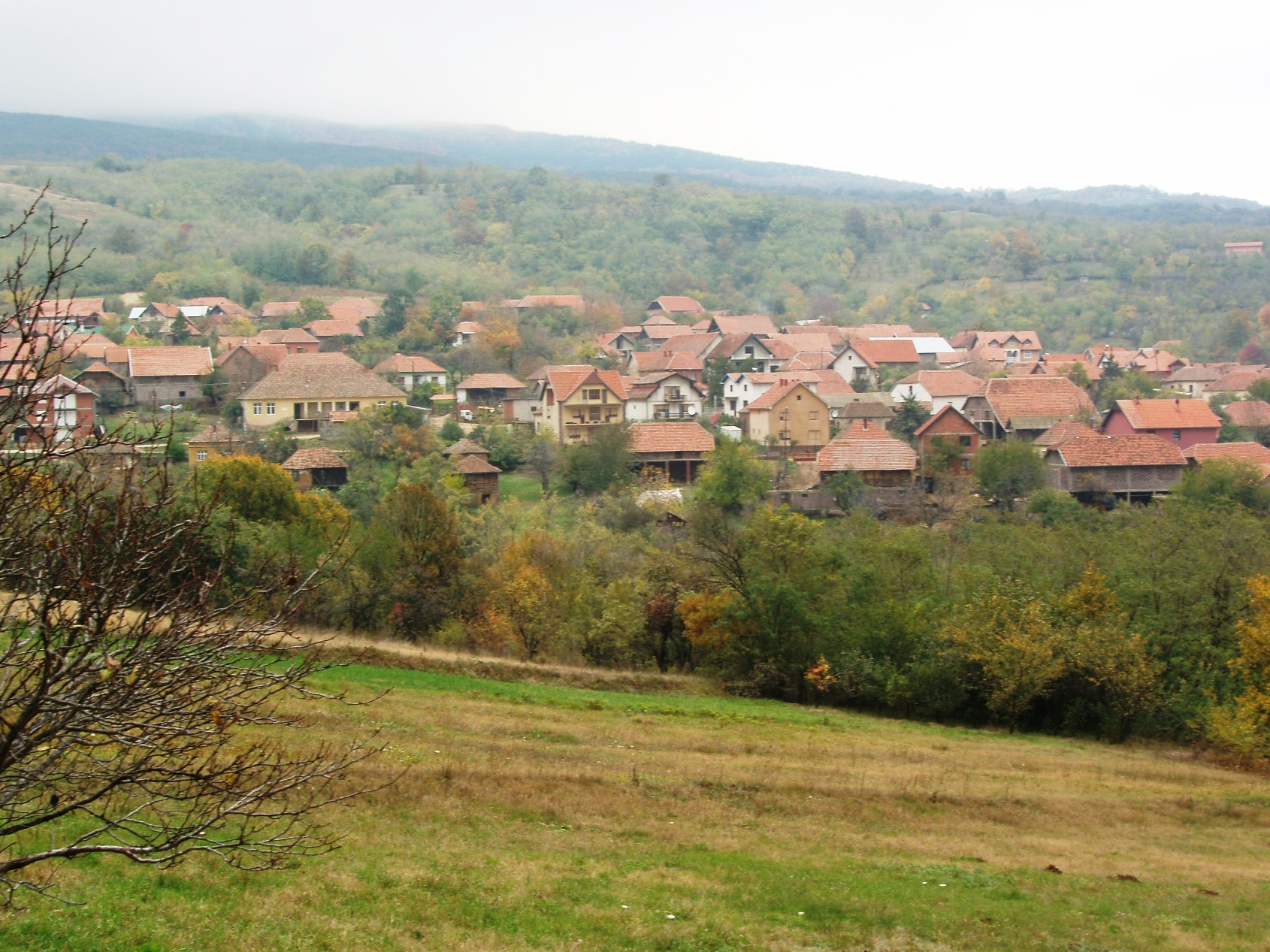 Панорама Црног Кала - The Panorama of Crni Kao.JPG